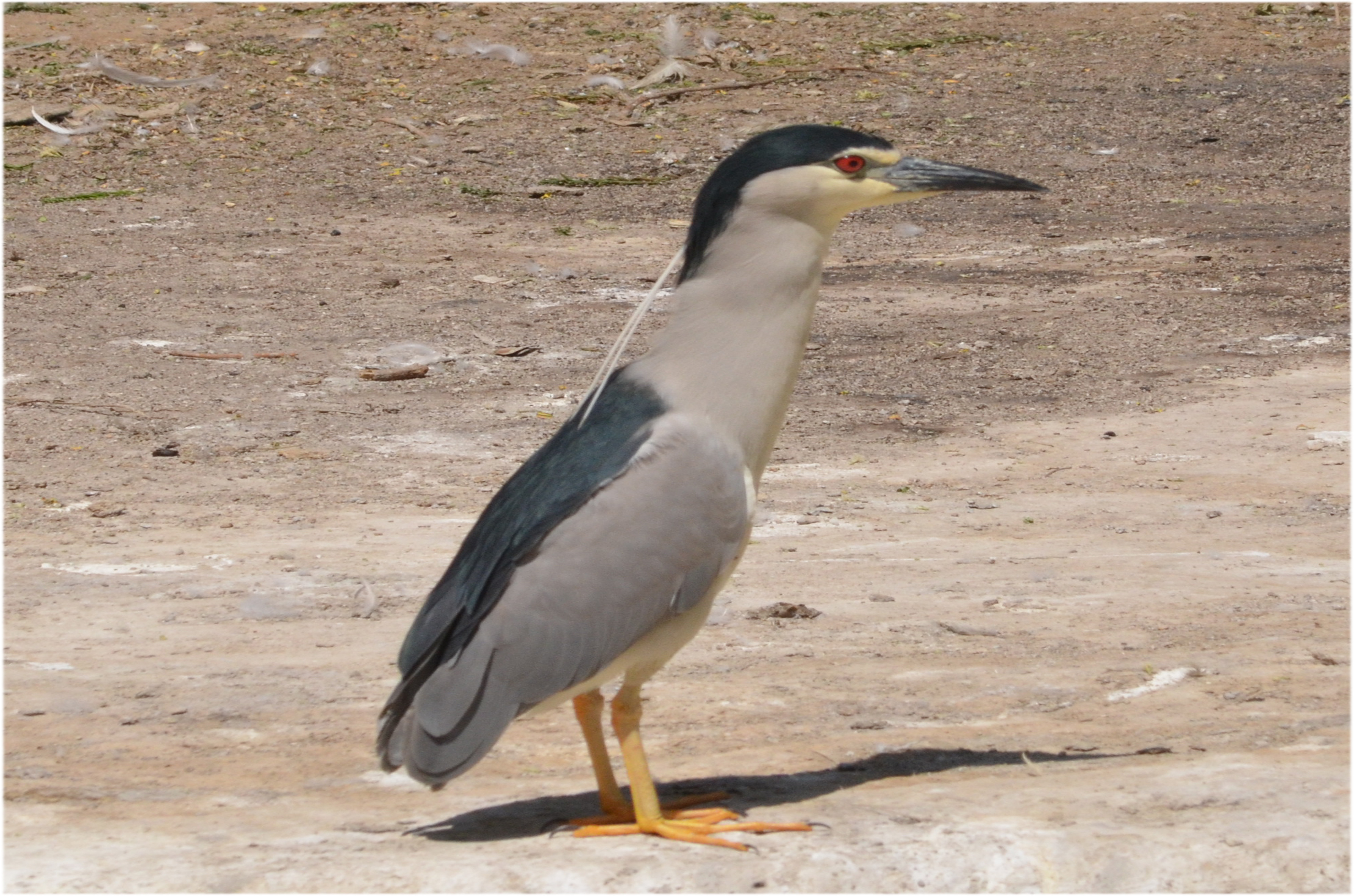 بلشون الليل في حديقة حيوان الجيزة